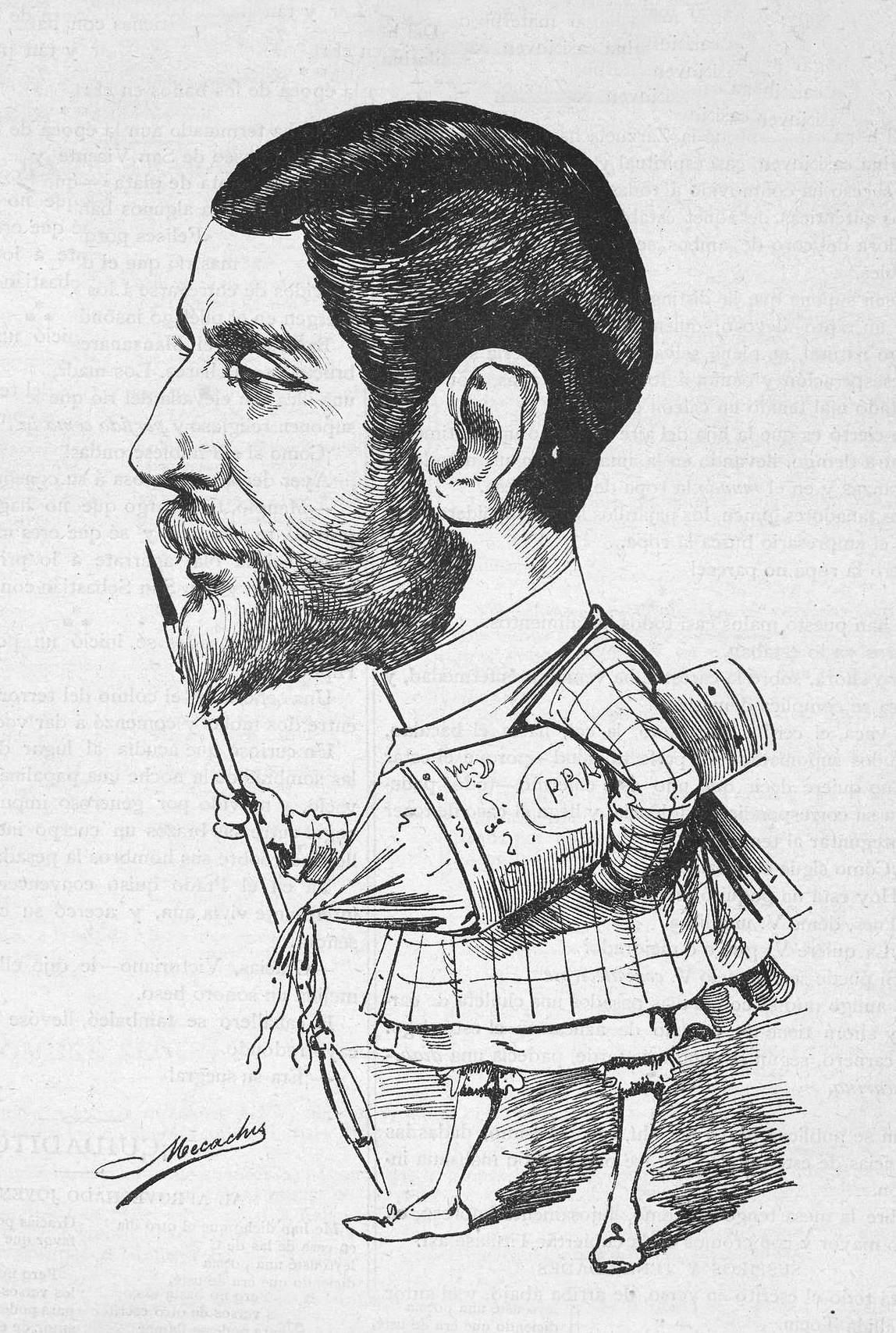 Caricatura de Ramón Cilla, publicada en la revista españolaMadrid Cómico.